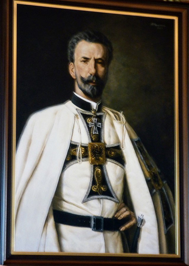 Eugen von Österreich-Teschen, Gemälde im Fürstenzimmer der Festung Hohenwerfen